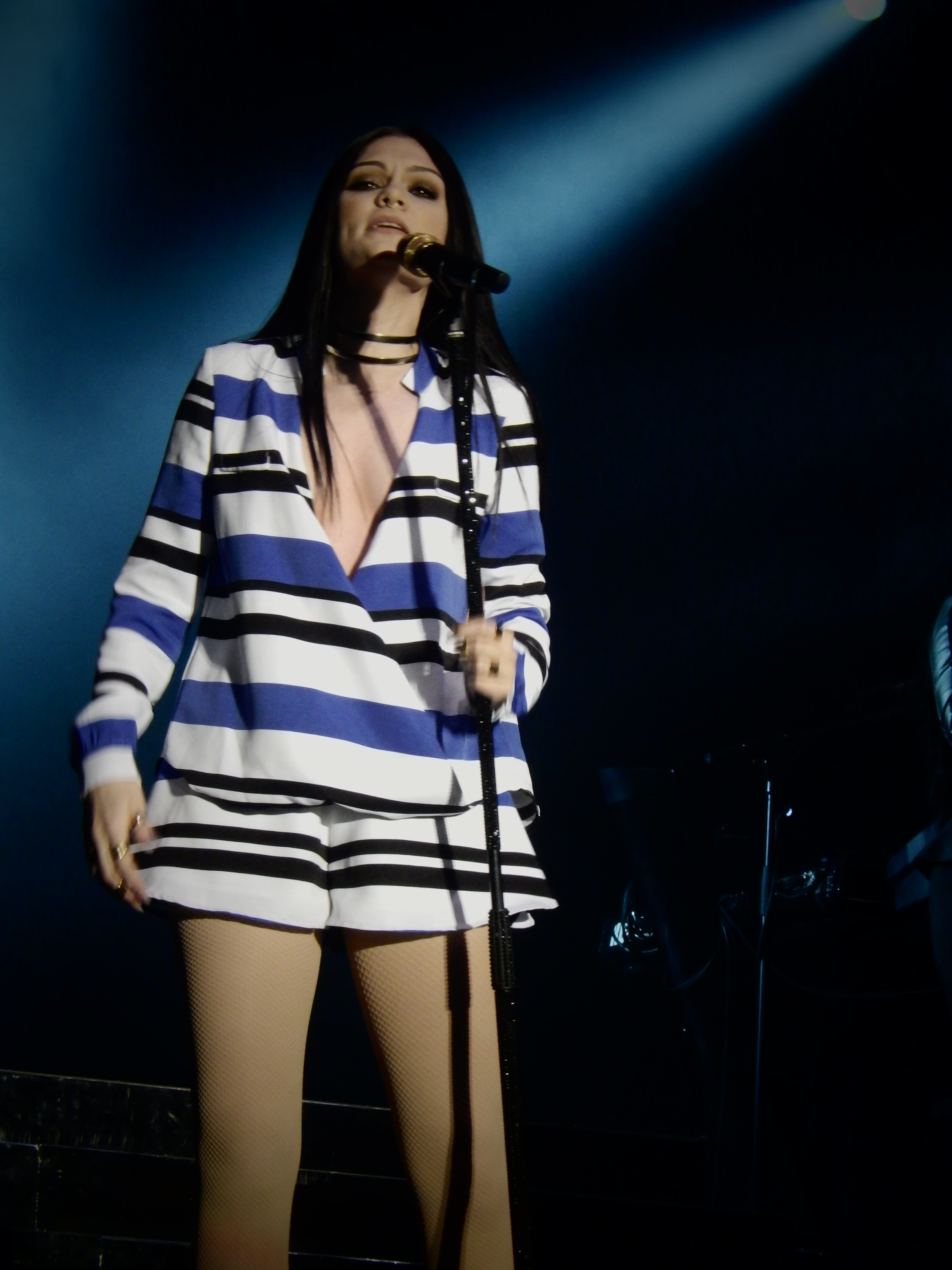 Jessie J, Somerset House, London